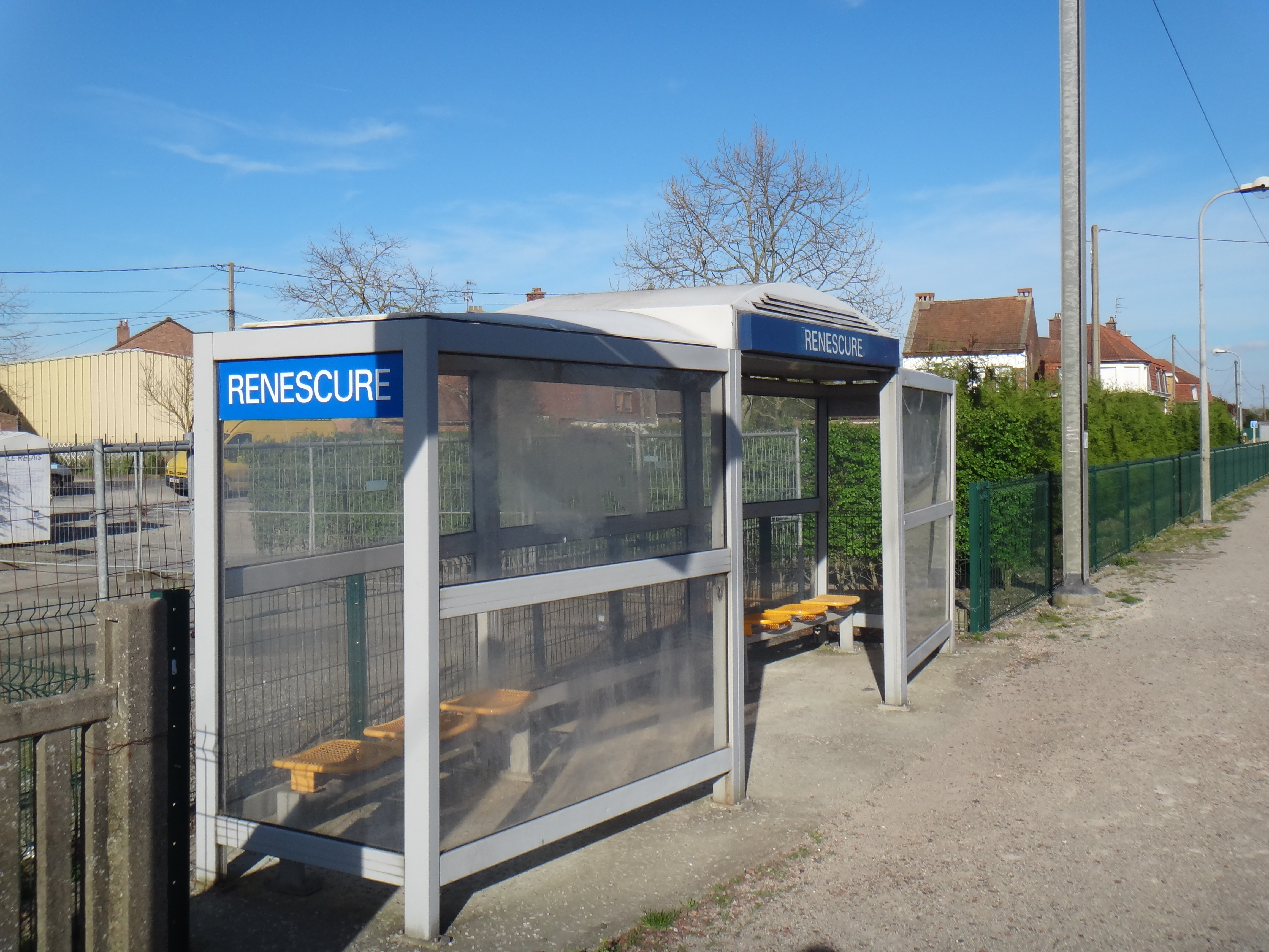 Gare de Renescure, Pas-de-Calais, France, en 2014